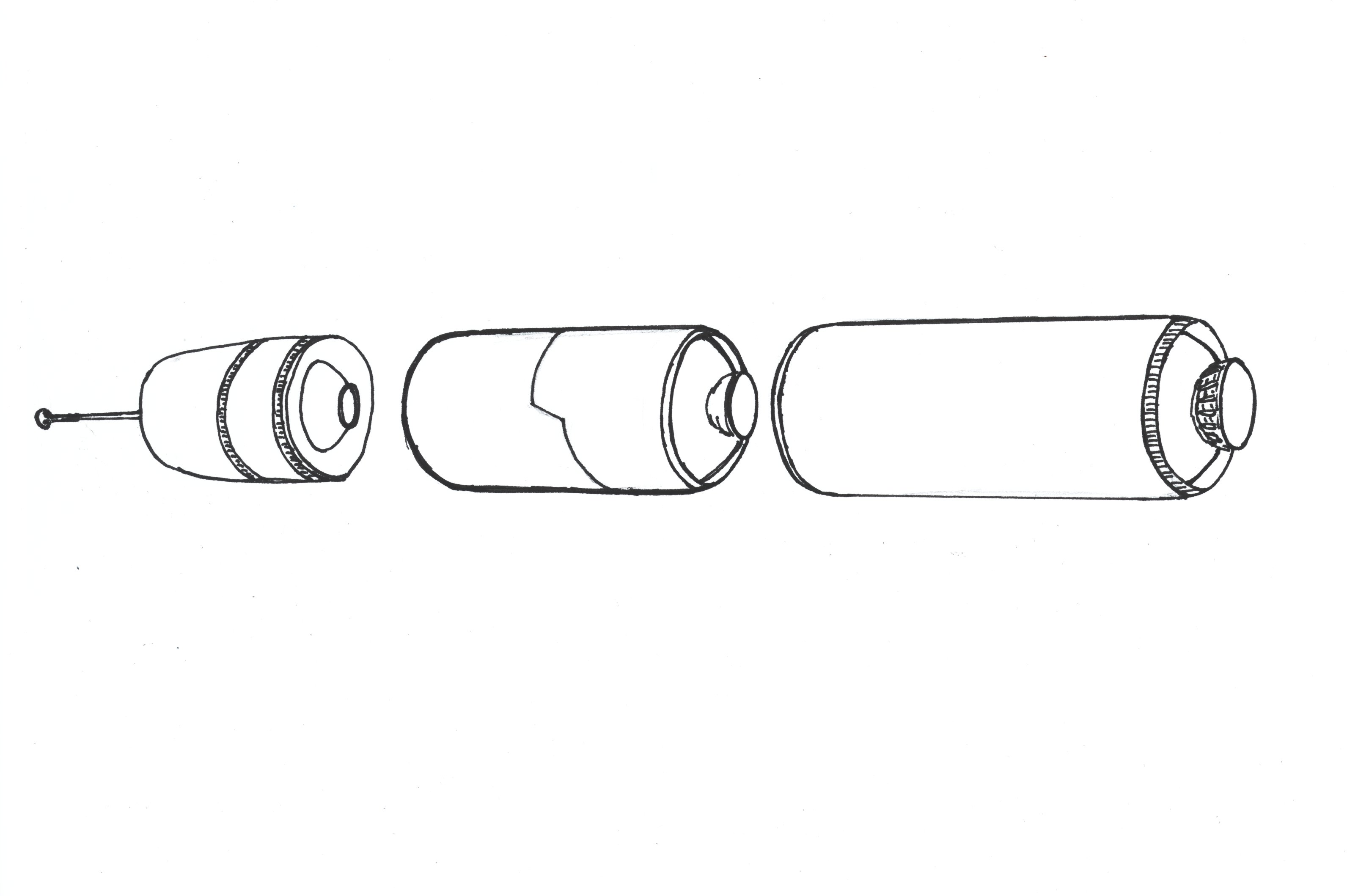 Missile M51, Missile ballistique M5 eclate